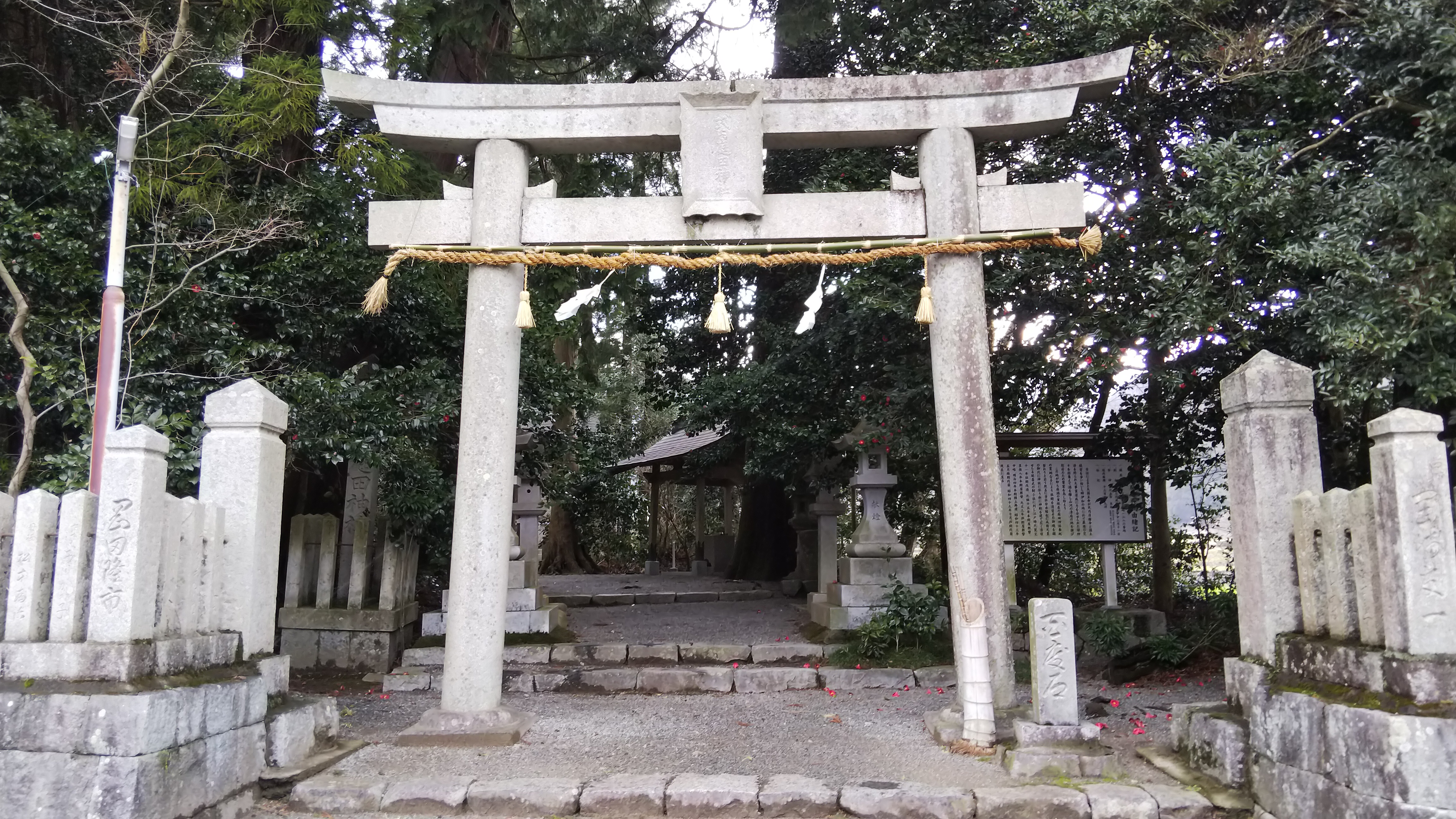 庭田神社鳥居